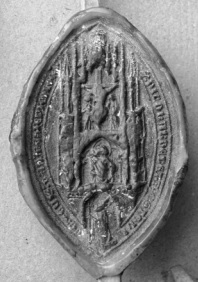 Apáti Miklós kalocsai érsek pecsétje, 1358